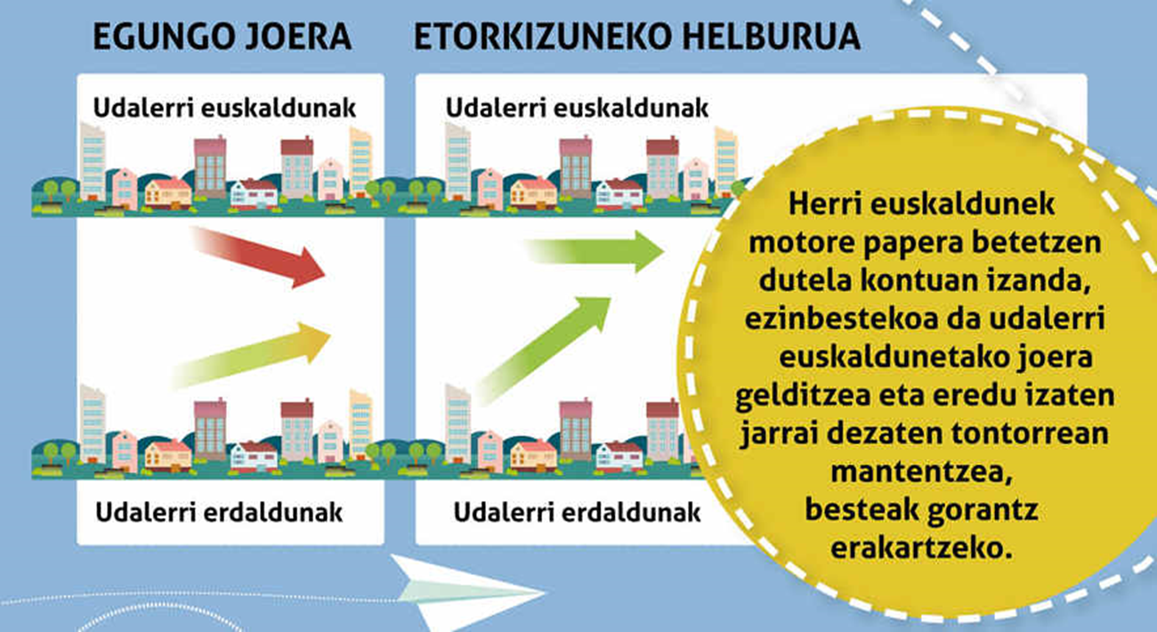 Udalerri euskaldunen zein erdaldunen garapena (UEMA)